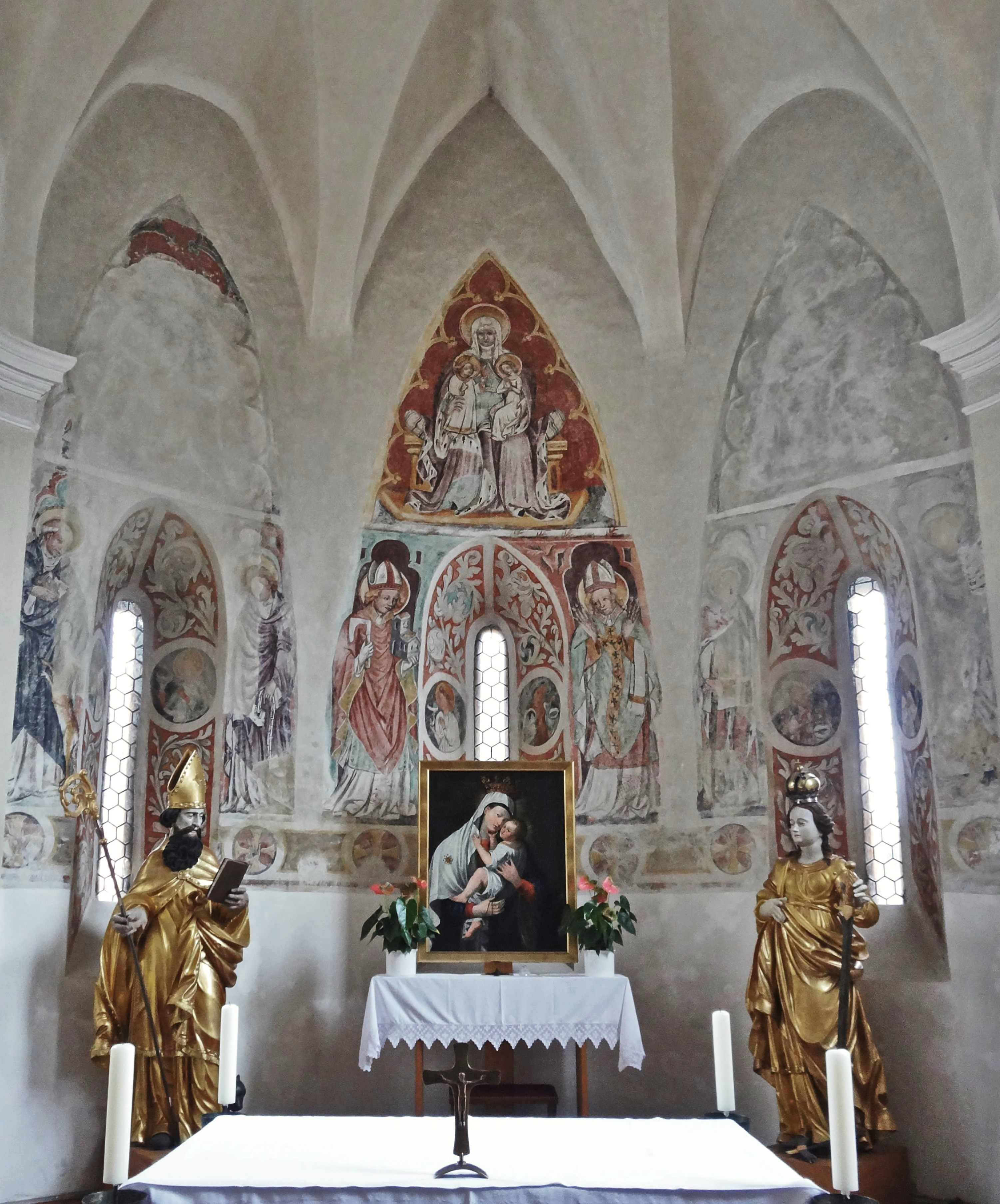 Ehemalige Pfarrkirche St. Martin in Högling (Bruckmühl)This is a photograph of an architectural monument.